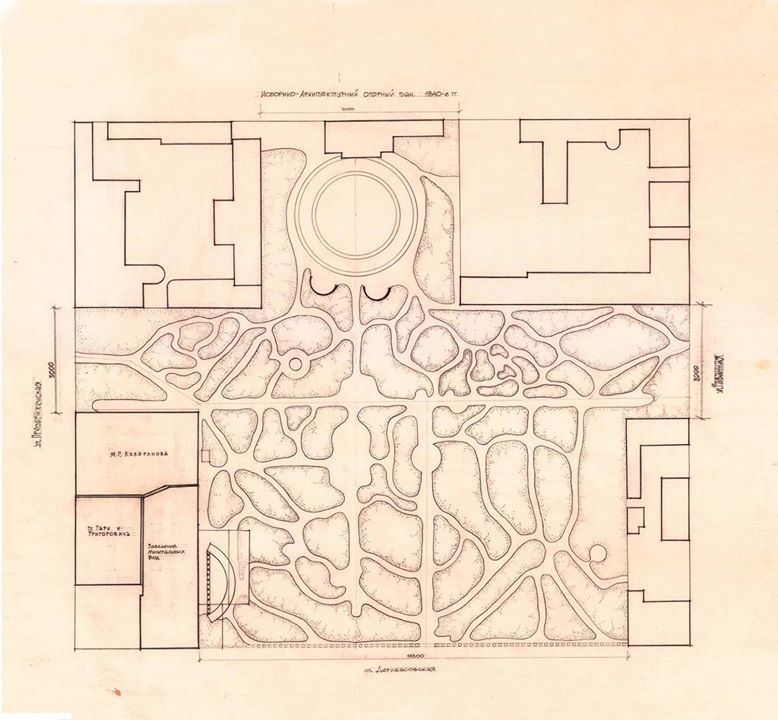 План Міського Саду станом на 1848р.